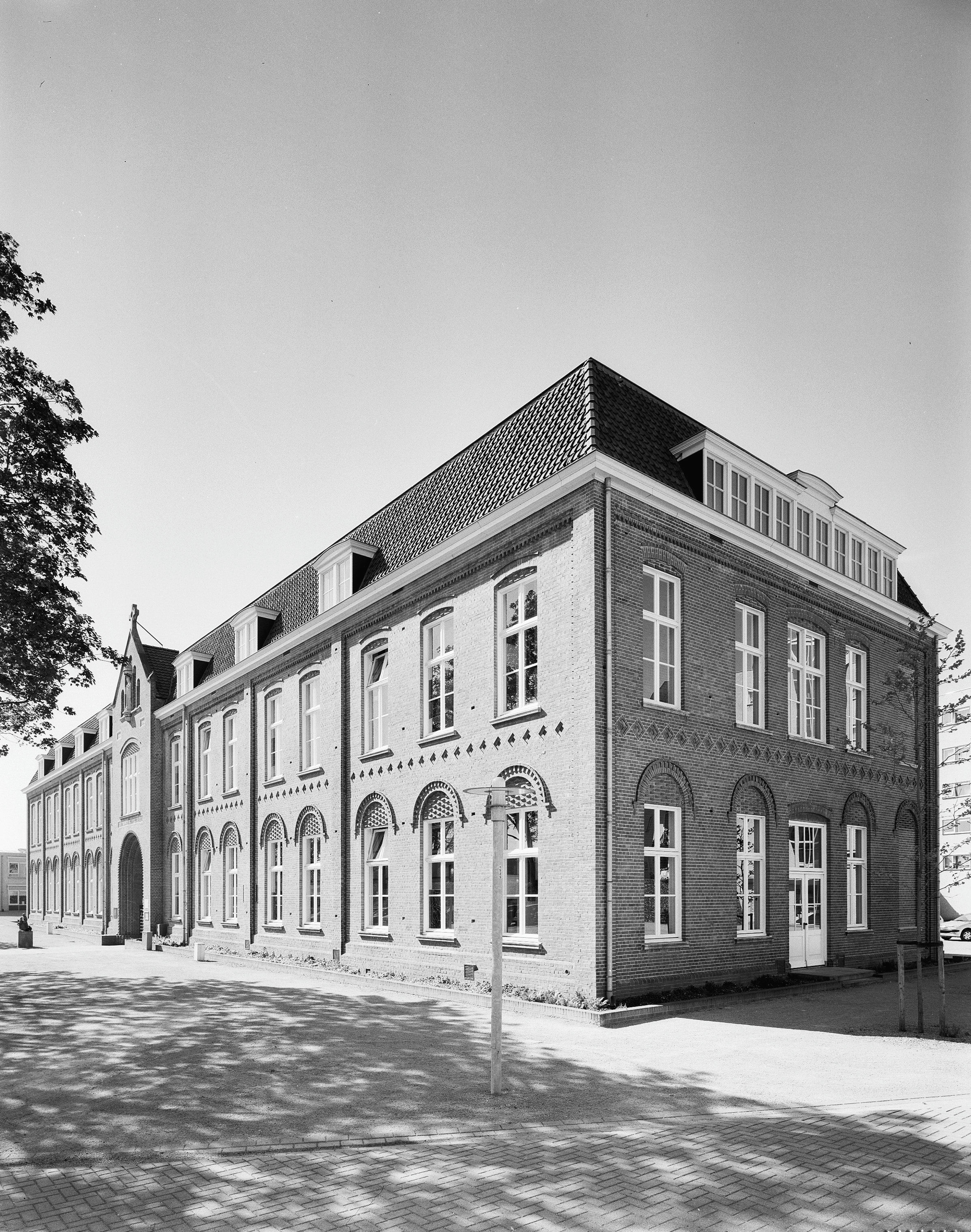 Rooms-Katholieke Kweekschool Maria Immaculata: Overzicht voorgevel en rechter zijgevel (opmerking: Gefotografeerd voor Monumenten In Nederland Limburg)